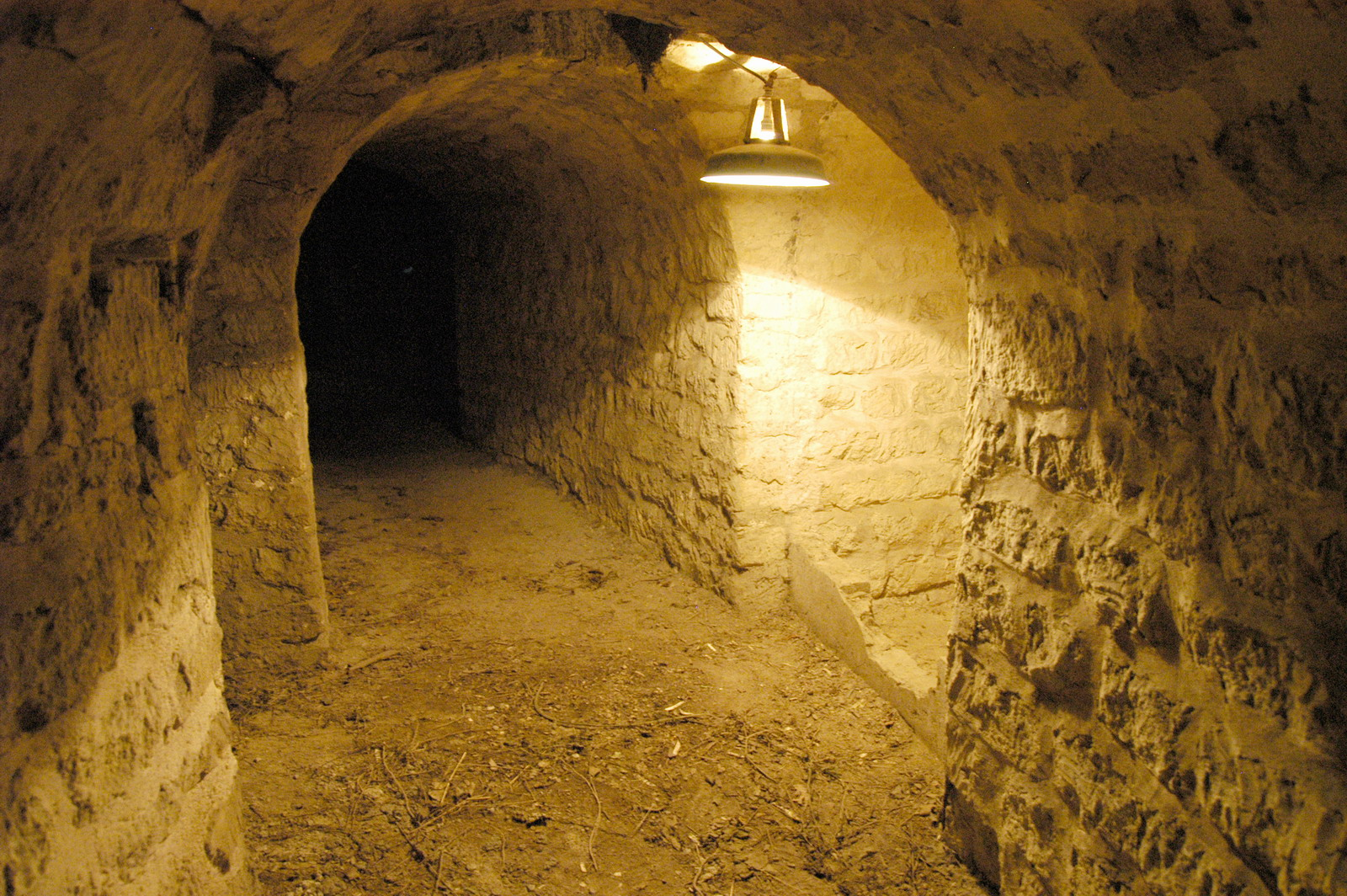 L'un des souterrains de contrescarpe de la Redoute de la Butte-Pinson à Montmagny (95 - France) (Fortification du Système Séré de Rivières).